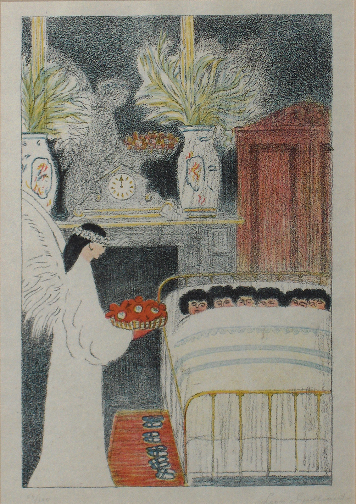 "Les plaisirs d'hiver"; Engelbewaarder brengt 'engelkoeken' naar zes slapende peuters; meerkleurendruk in de reeks "Collection du Petit Artiste" door de Belgische kunstenaar Léon Spilliaert; collectie Mu.ZEE, Oostende